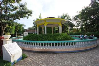 El área del parque lo comprende una manzana de terreno con árboles antiguos de caoba de 40 metros de altura, plantados desde 1885, tiene plantas ornamentales, tiene varios monumentos como el monumento a la madre, a Rubén Dario, a Monseñor Antonio Madrigal, al trabajador, placa en honor a la labor de Martha Adriana Peralta alcaldesa en el periodo 1997-2000,declarada mujer del siglo e hija dilecta de Ocotal; placa declarando a Ocotal ciudad universitaria el 8de junio de 1996, un monumento símbolo del proyecto de agua potable y un quiosco donde se comercializan refresco naturales.